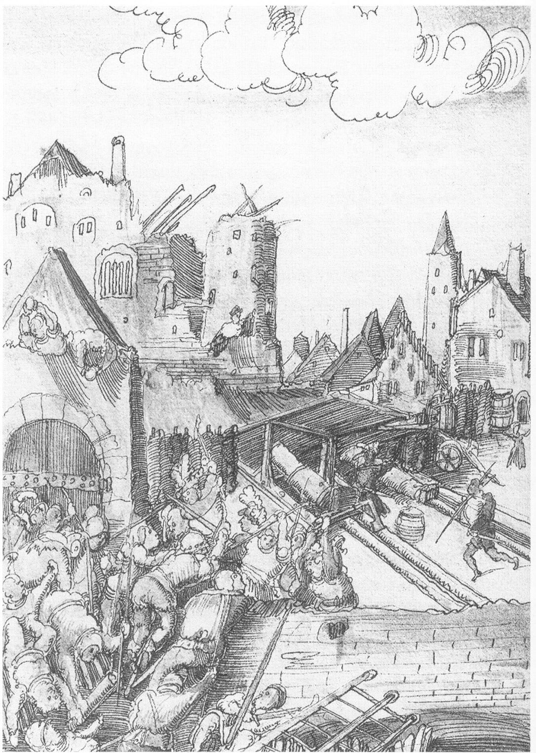 Die Belagerung Kaiser Friedrichs III. in der Wiener Burg im Jahr 1462 Historia Friderici et Maximiliani